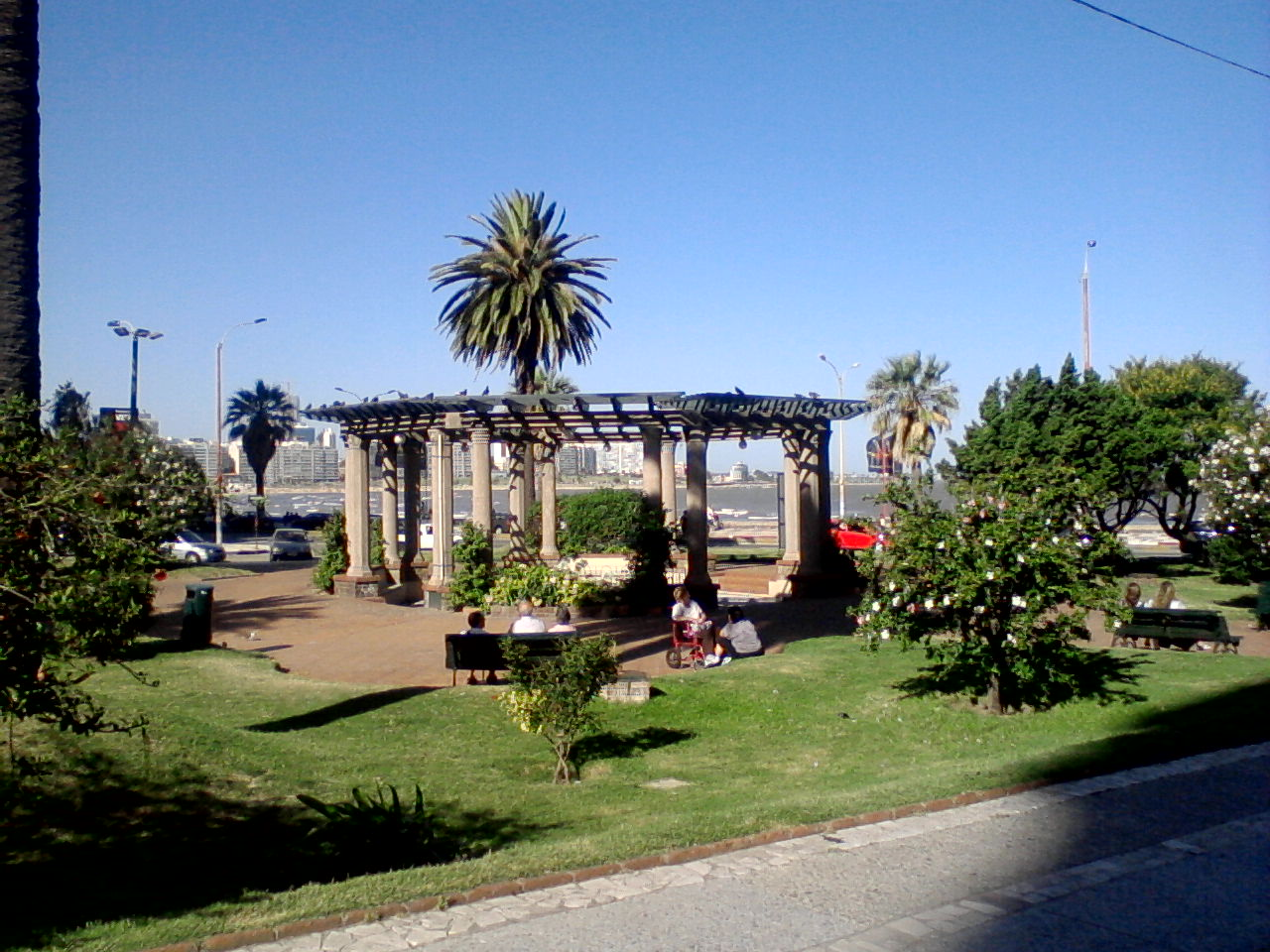 Pza Gomensoro